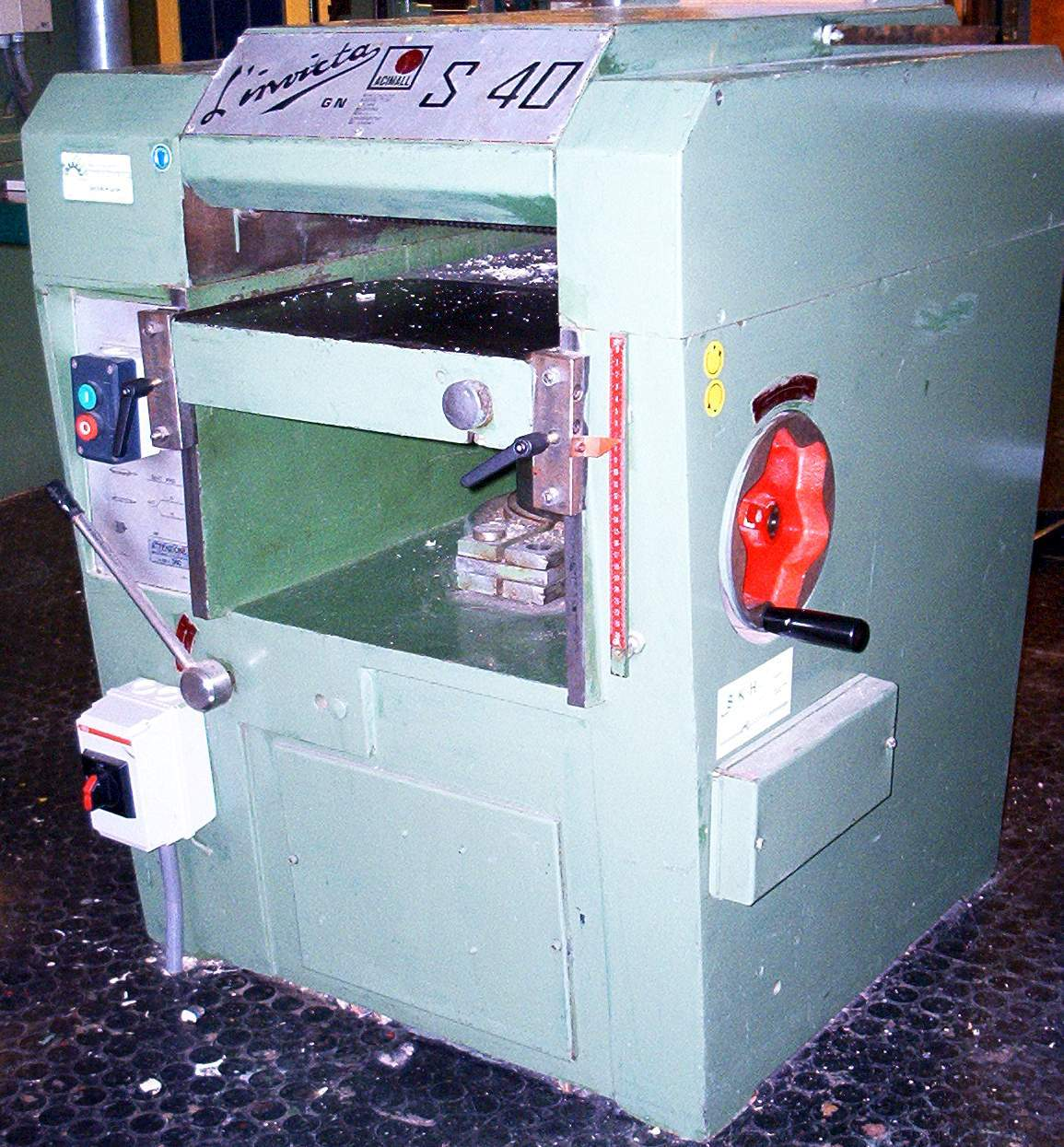 zelf gemaakte foto t.b.v. het publiek domein. Martink. Datum op camera klopt niet, moet zijn 03/17/2006 Categorie:Afbeelding gereedschap